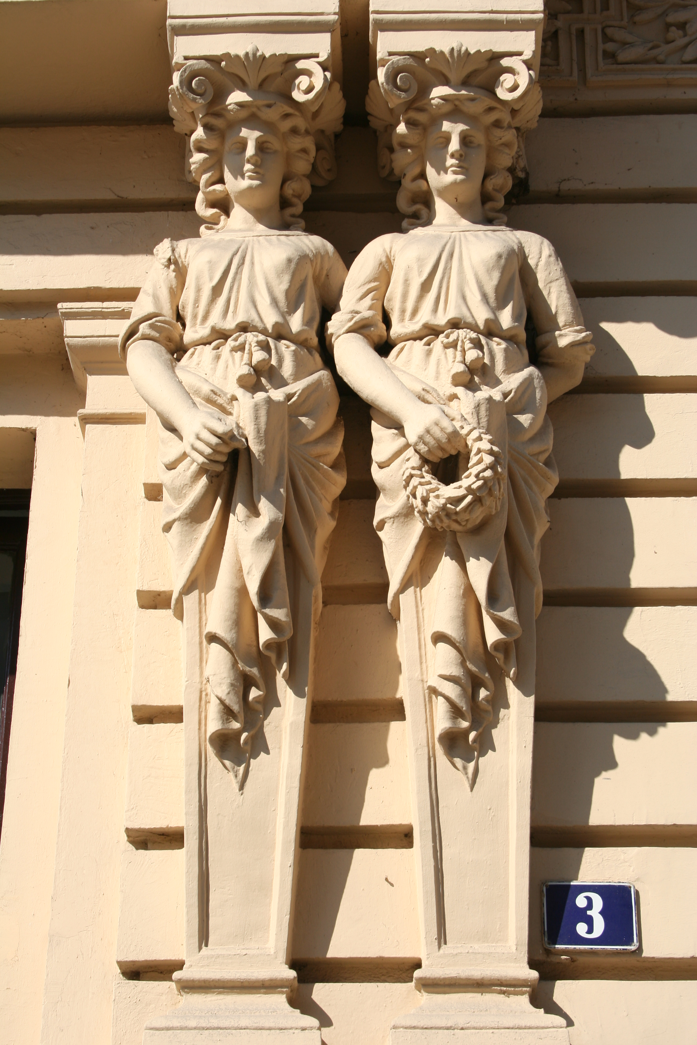 Zgrada gimnazije, Valjevo